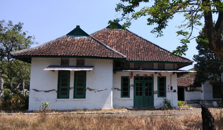 Hingga saat ini bangunan tersebut masih tetap berdiri di Kawasan Pabrik Gula Cepiring